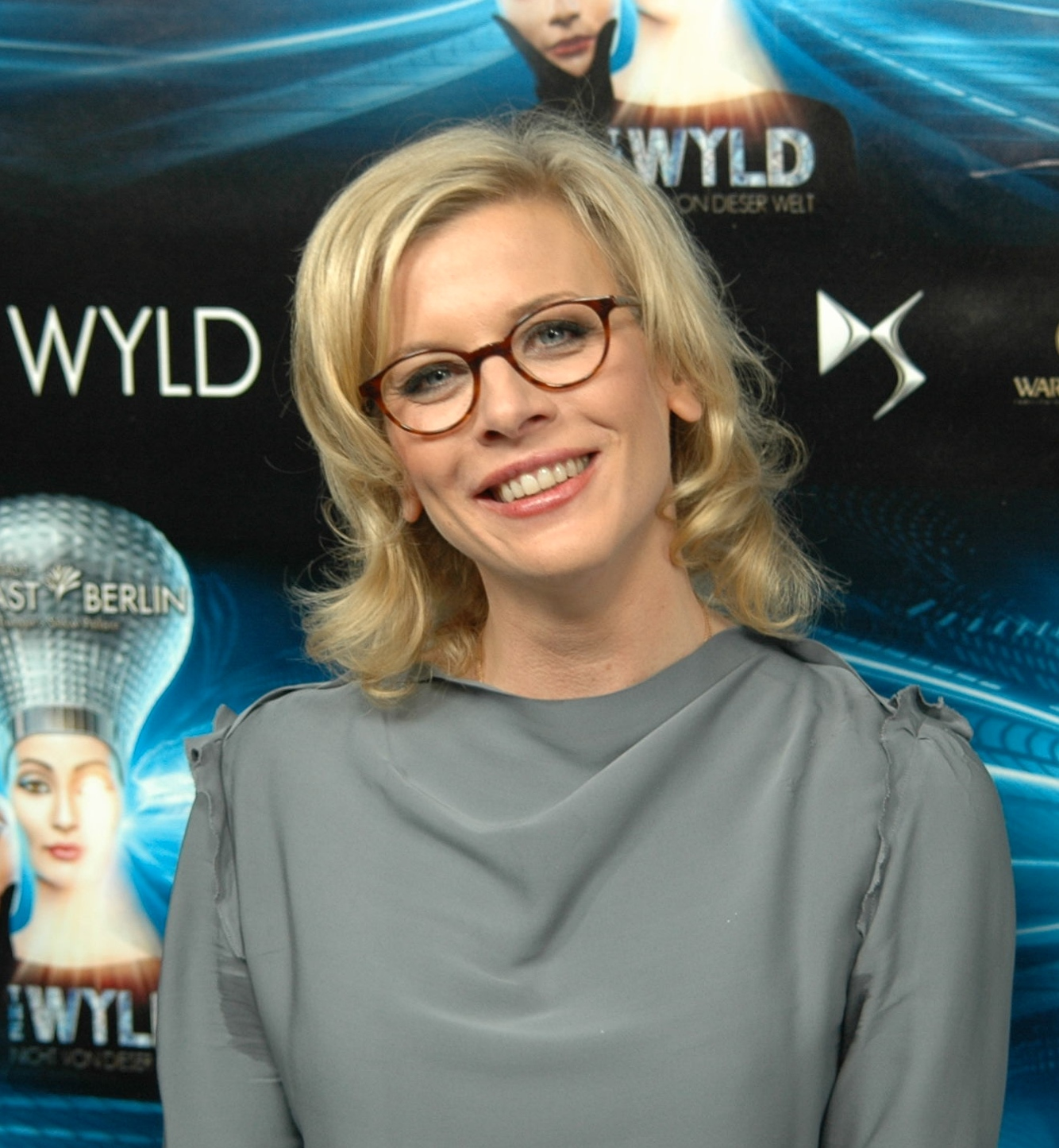 Eva Habermann